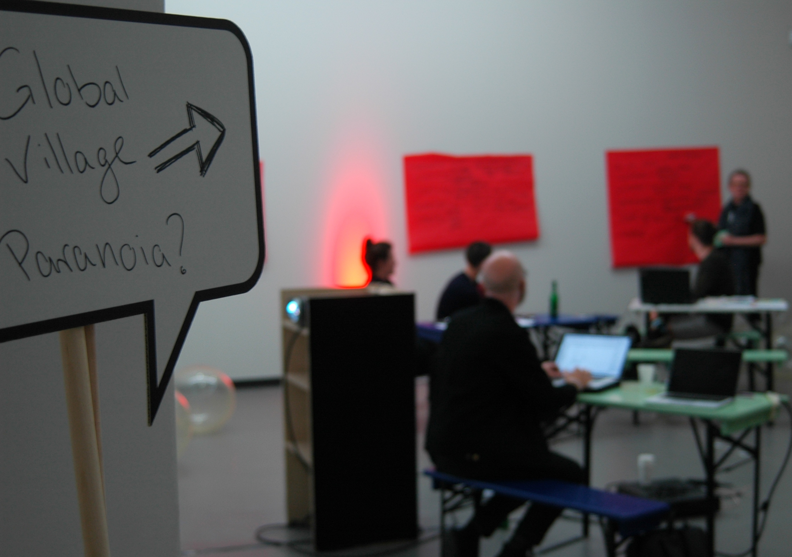 NRW-FORUM DÜSSELDORF, META Marathon, Global village